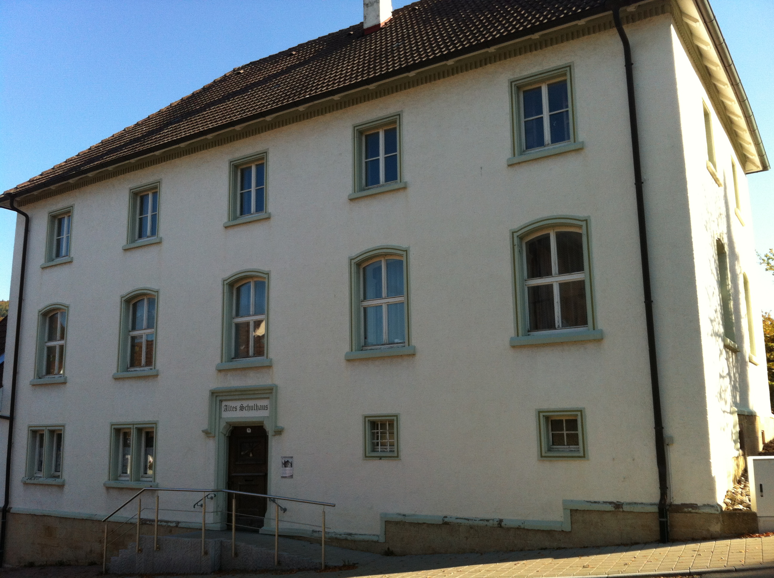 Blumberg, Stadt im Schwarzwald-Baar-Kreis in Baden-Württemberg. Altes Schulhaus Baujahr 1846. Heute von Vereinen und Organisationen genutzt.